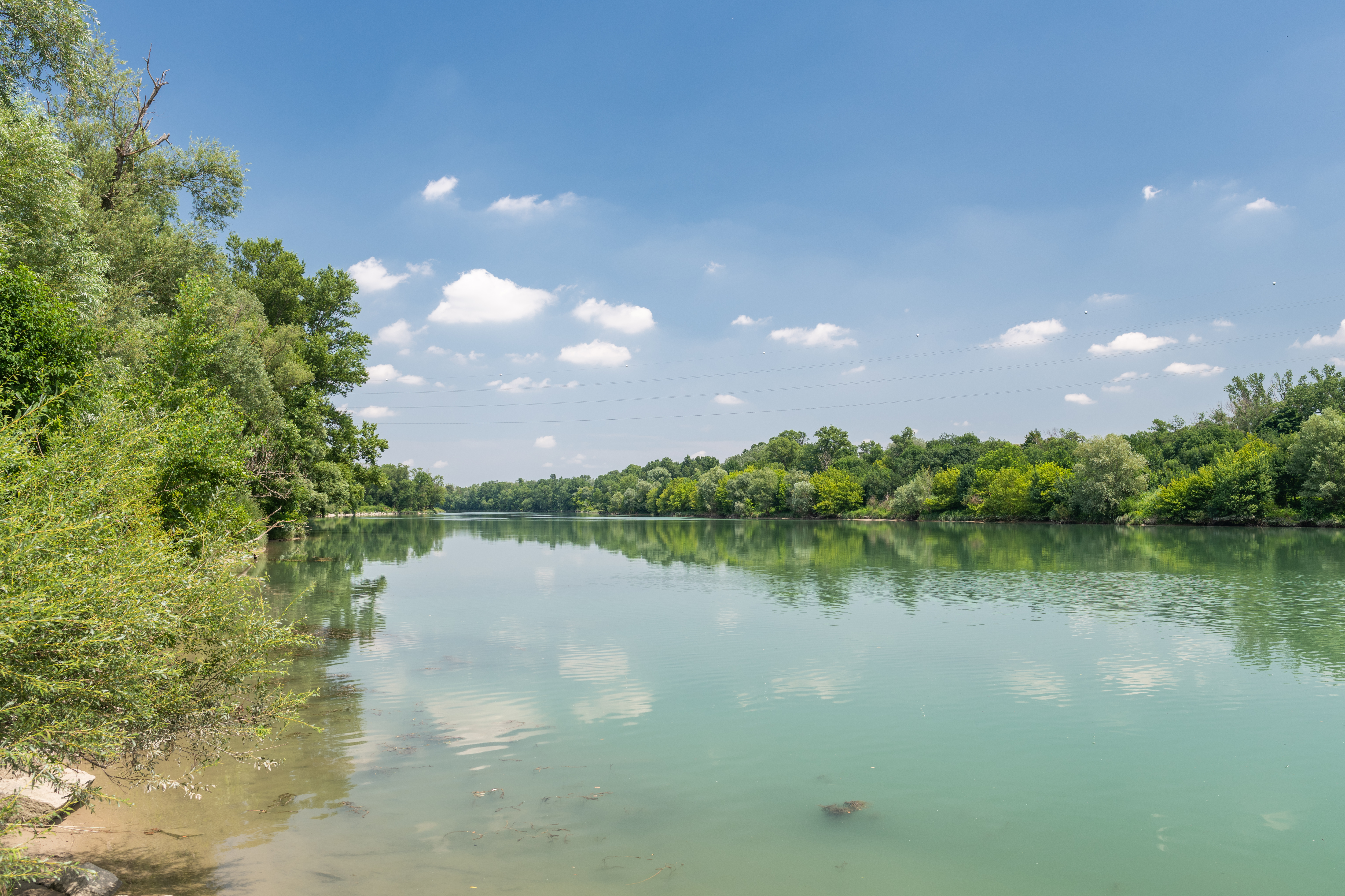 Vue du Vieux Rhône depuis le Parc du Rhône à Grigny.